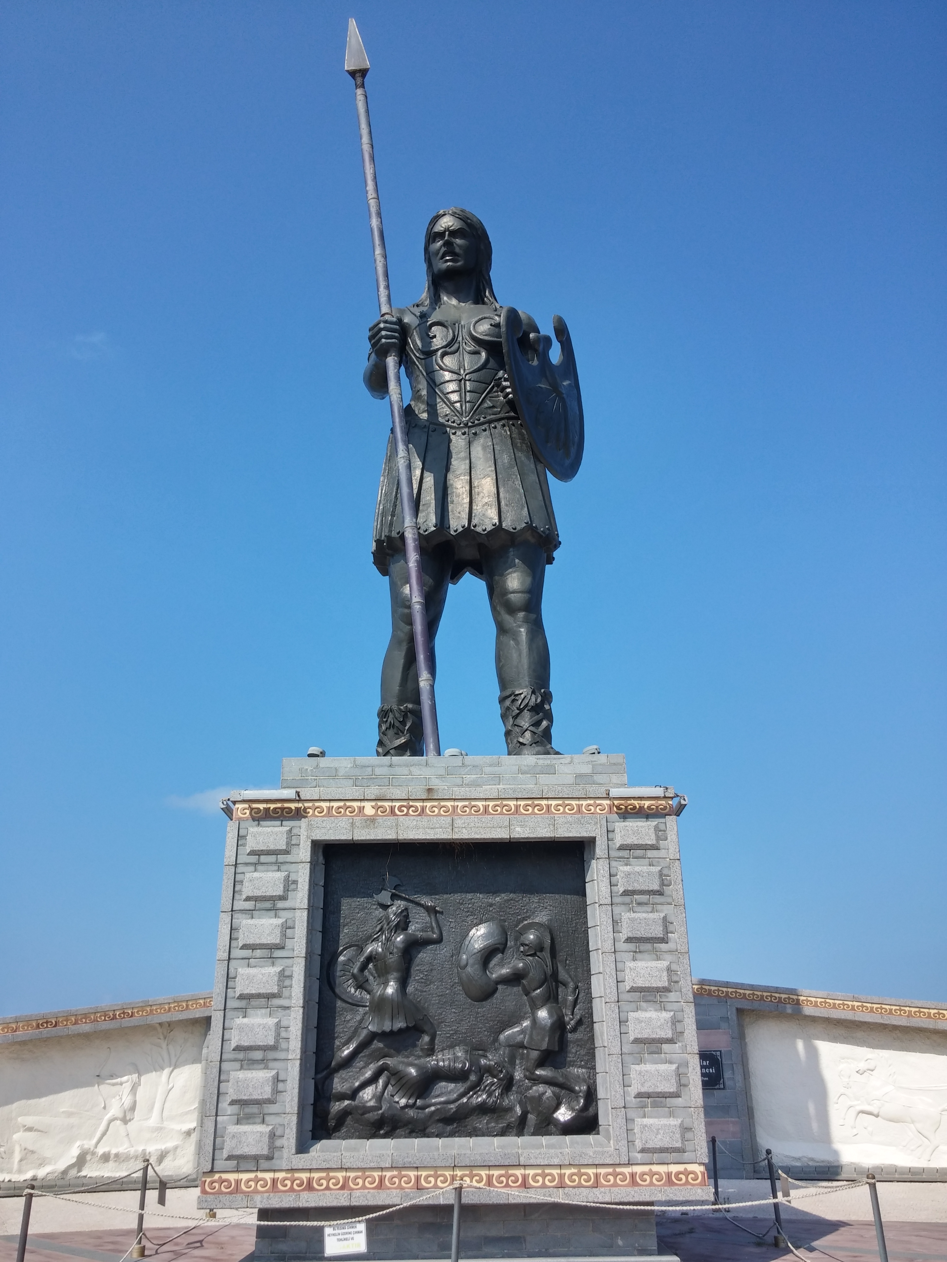 Samsun'un Atakum ilçesindeki Amazon Parkı'nda yer alan Amazon Anıtı.